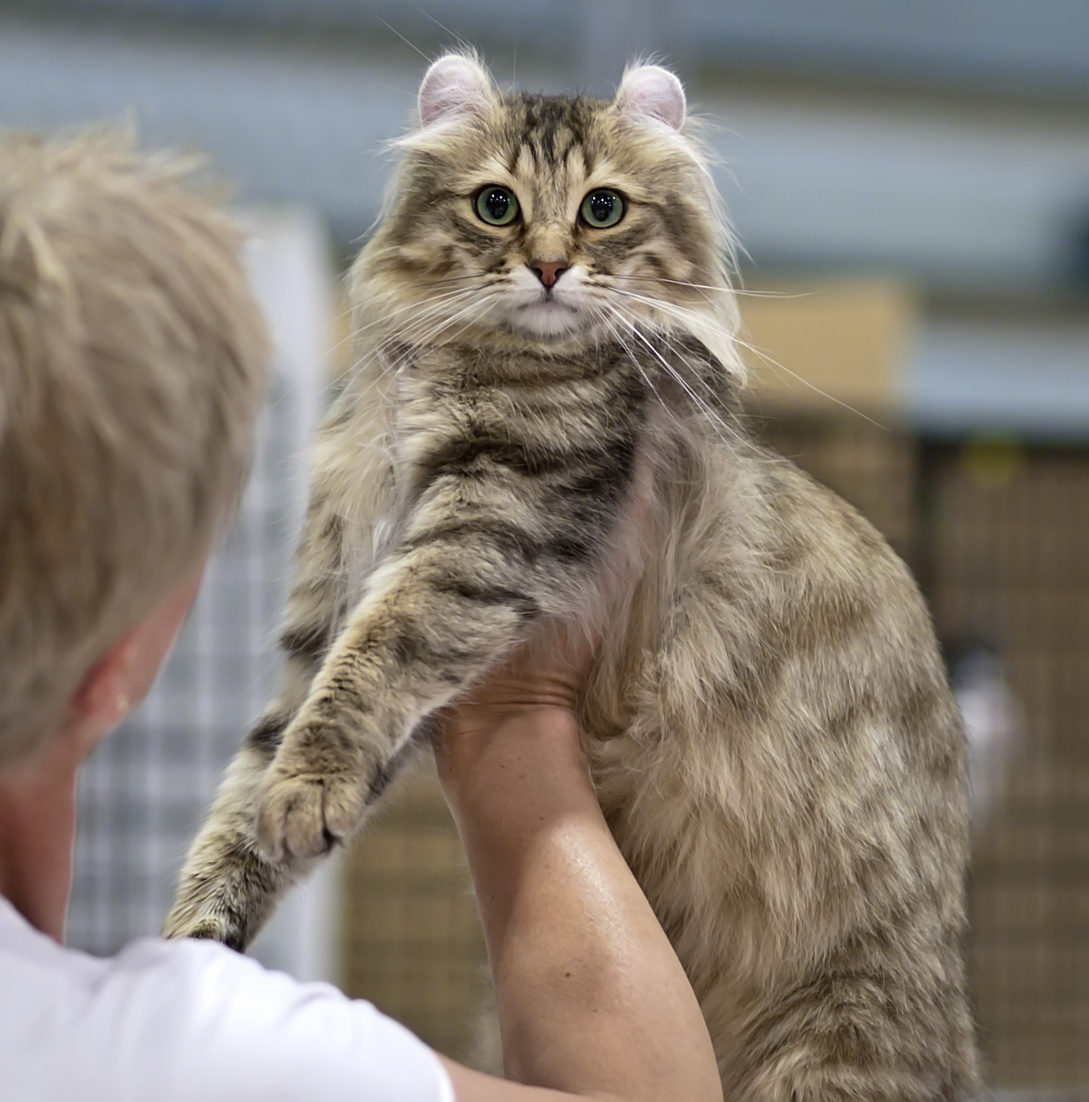 Un american curl à poil long durant l'exposition féline de Jämsä en 2010. Code EMS : SP,GIC Siriuksen LeoCurl (Figaro) [ACL n 24] male EX1 CAPS SP NOM